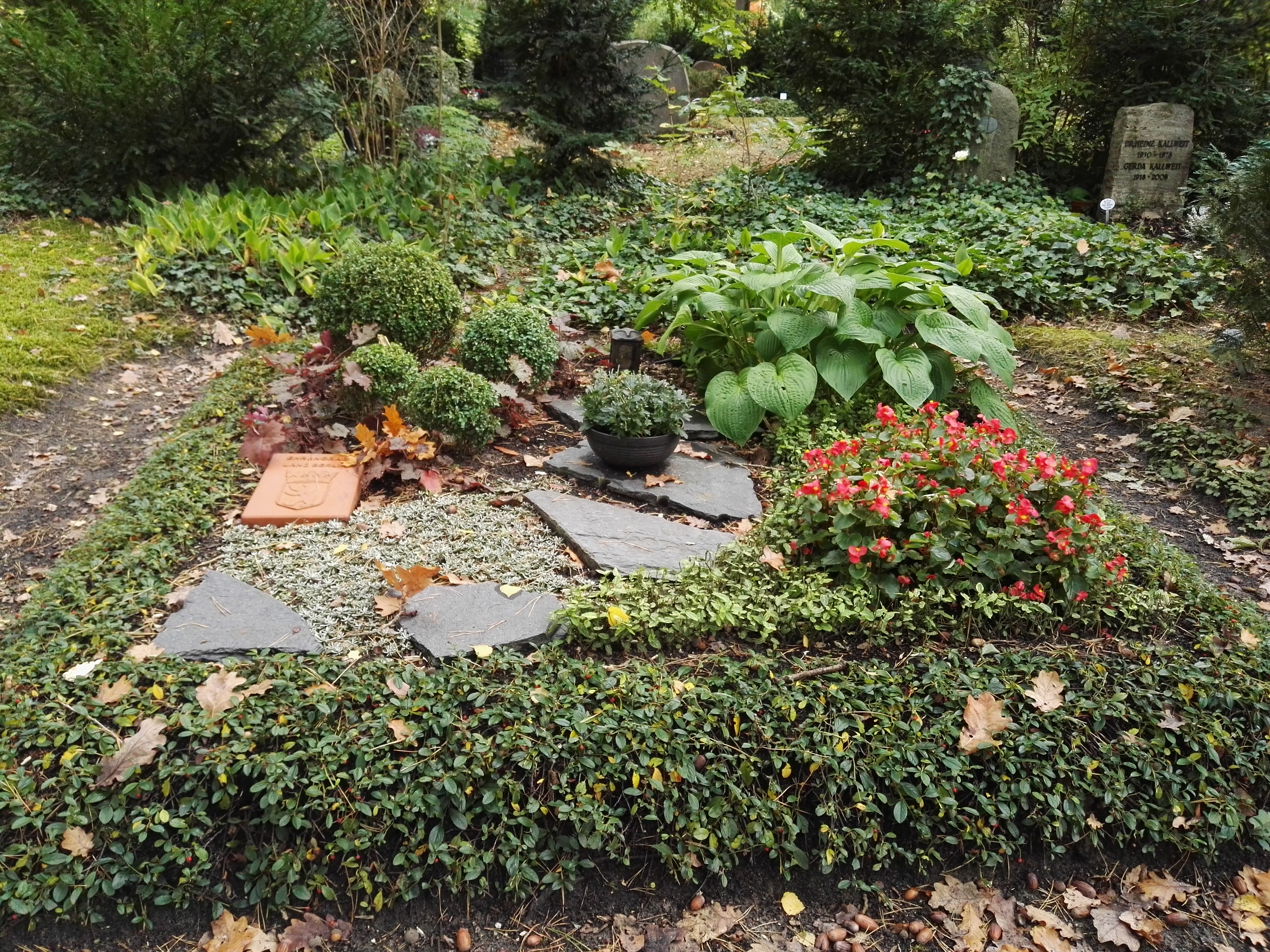 Ehrengrab von Götz Friedrich auf dem Waldfriedhof Zehlendorf; ohne Grabstein